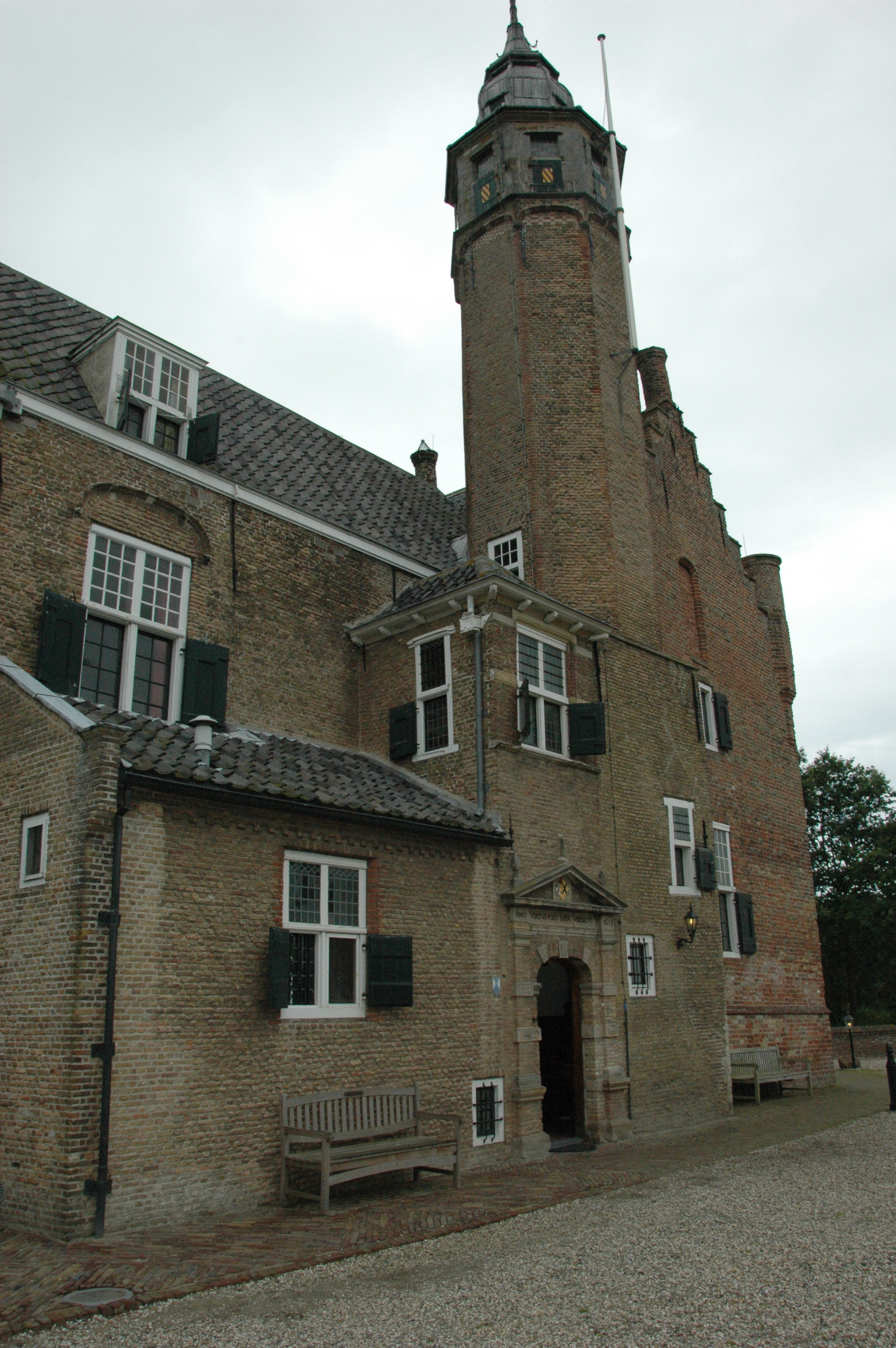 Slot Moermond, Renesse Categorie:Wikipedia:Afbeeldingen/Gebruiker:P.H. Louw